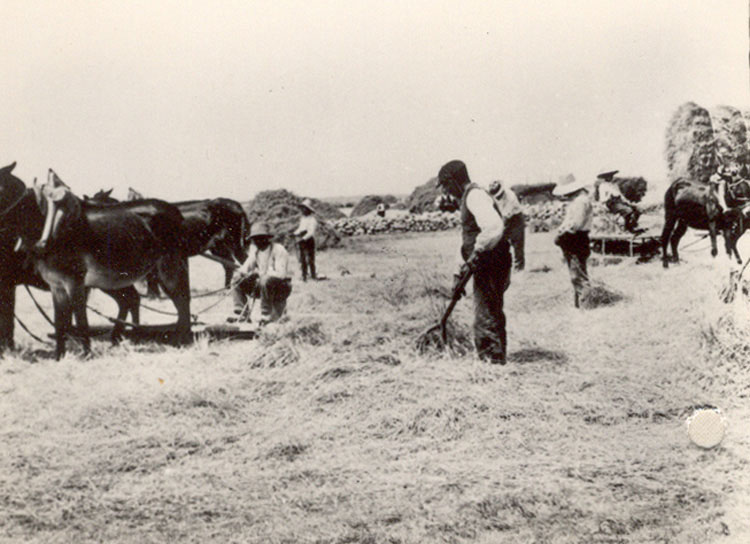 Recolección - Lomoviejo (Valladolid) - Colección de cromos álbum de Valladolid editado por la Caja de Ahorros Provincial en 1962. Tareas de recolección. - Fotografía 60 x 42 B/N